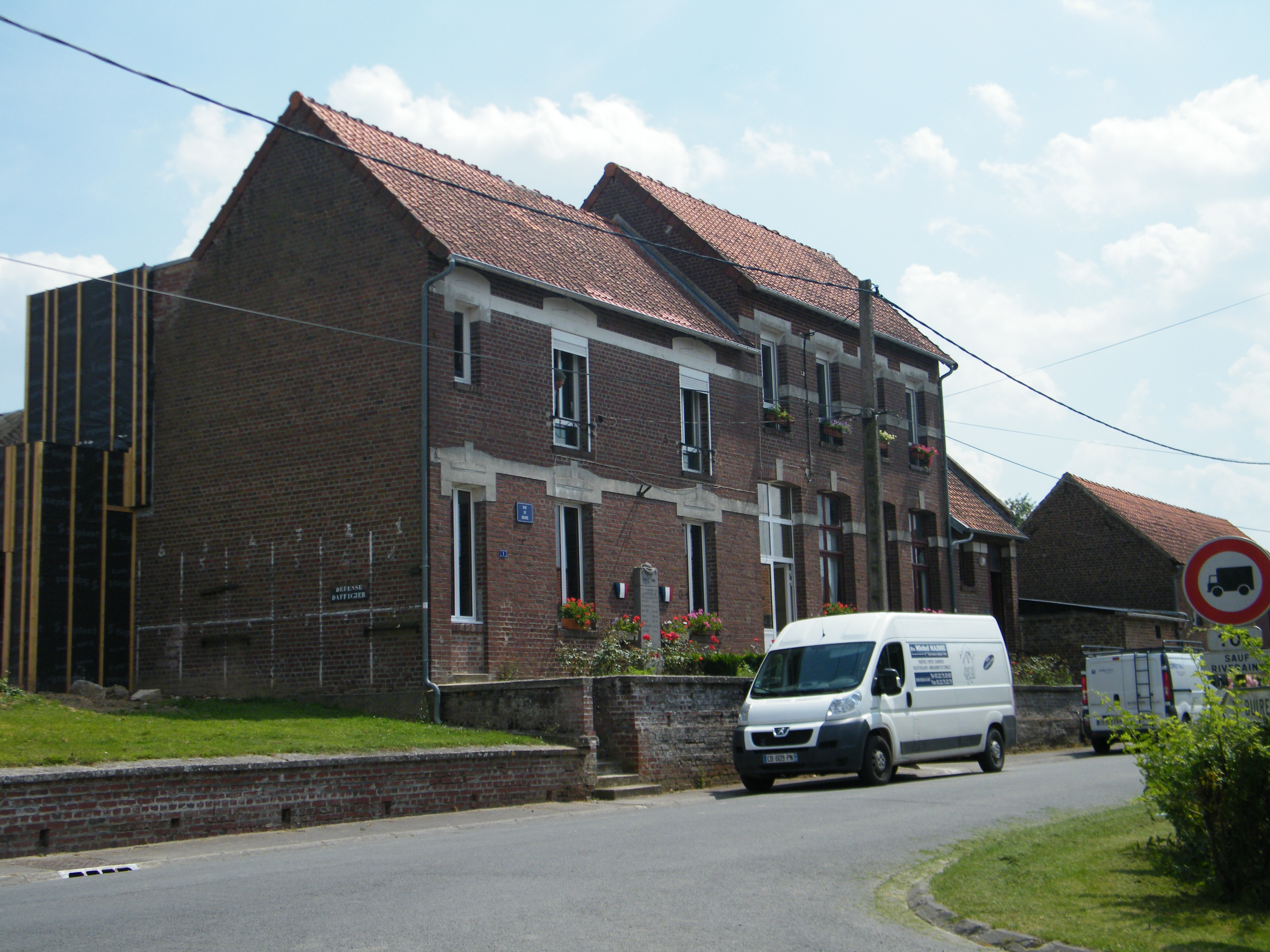 Mairie.